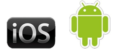 iOSyAndorid